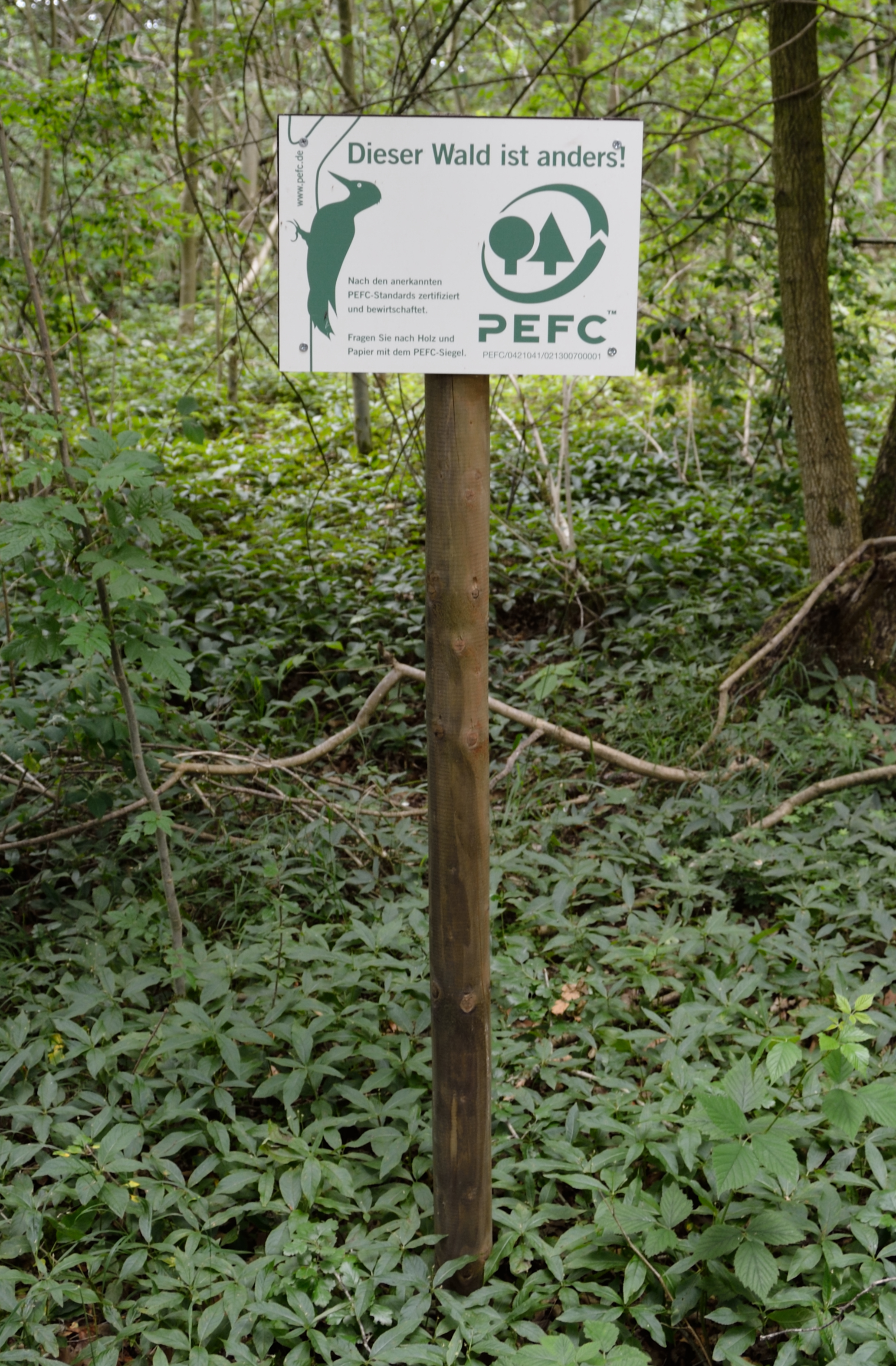 Hinweisschild: Programme for the Endorsement of Forest Certification Schemes in einem Wald am Harzhorn in Niedersachsen